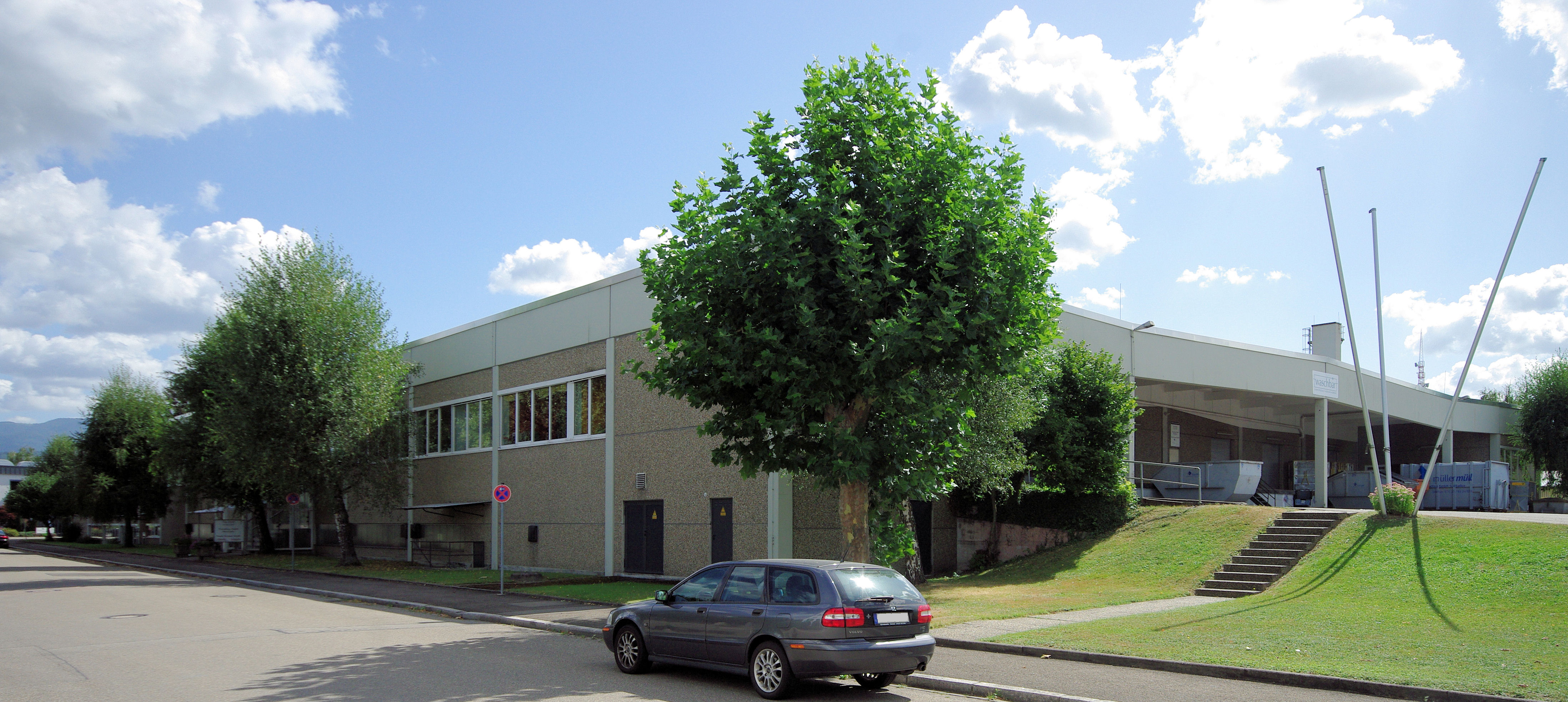 Das Betriebsgebäude des Waschbär Umweltversandes